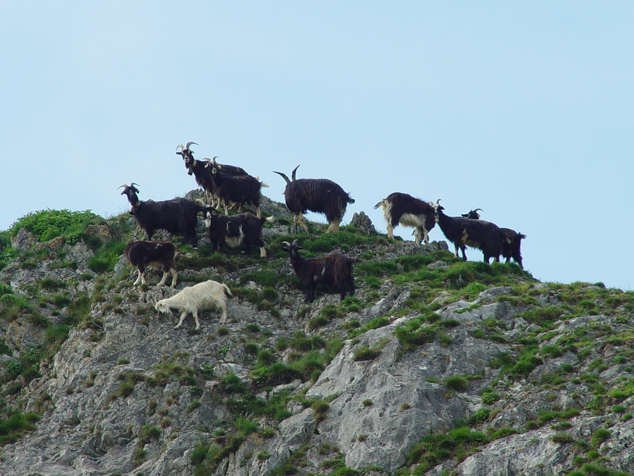 Pyrenean goats (Pyrenean goat breed) on Pic de La Clique (1200 m), Germs-sur-Oussouet, High Castelloubon, Canton de LoUrdes-Est, Hautes-Pyrénées